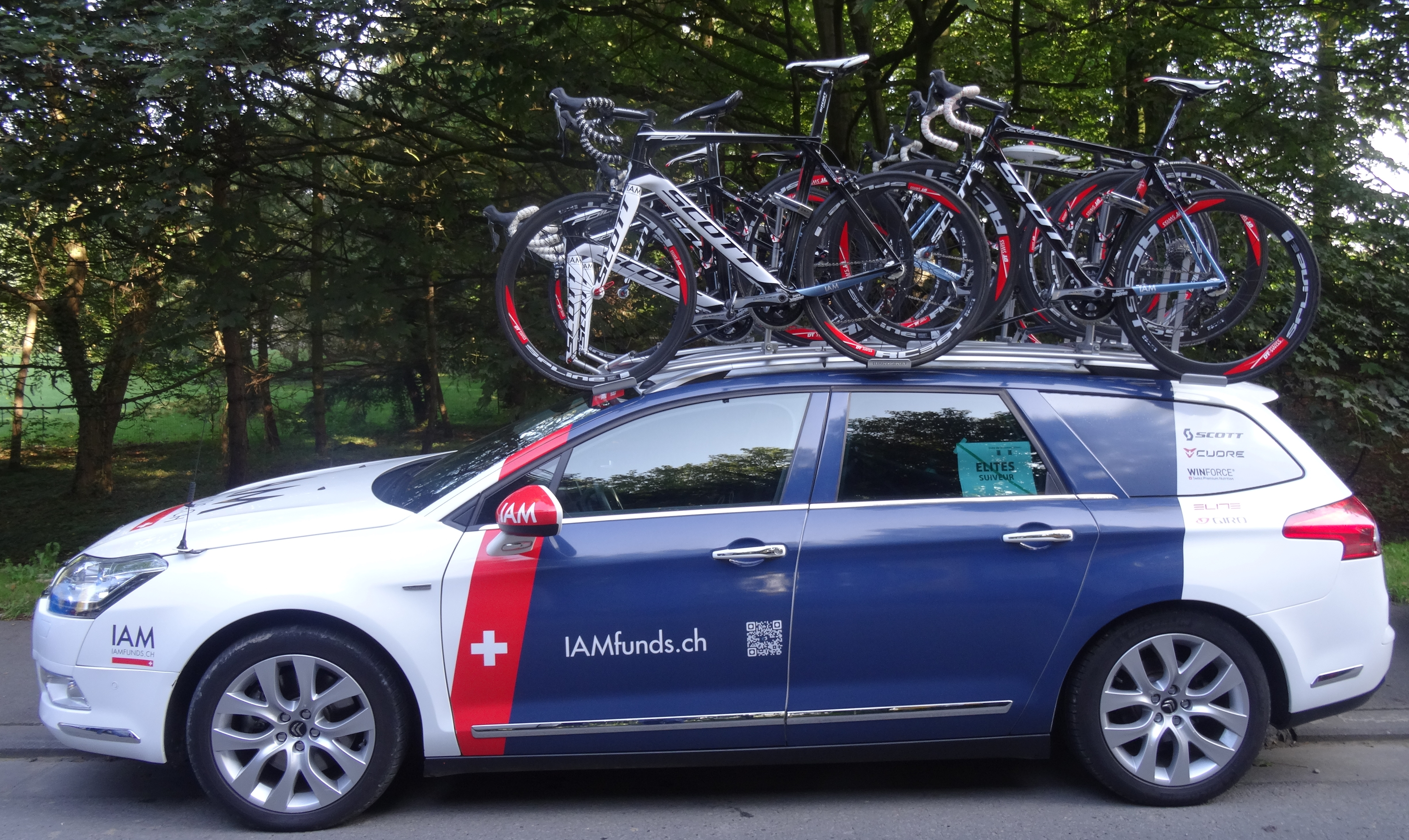 Reportage photographique réalisé le vendredi 3 octobre à l'occasion du départ de la deuxième étape de l'Eurométropole Tour 2014 à Estaimbourg (Estaimpuis), Belgique.